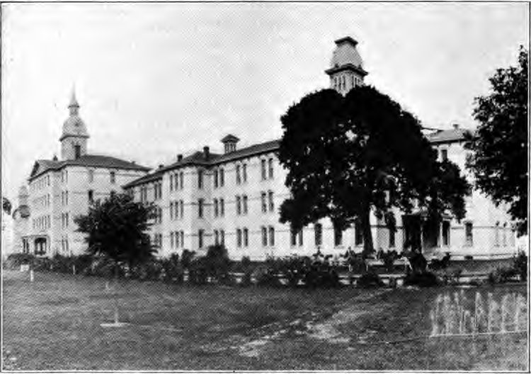 Oregon State Hospital in Salem, Oregon circa 1920